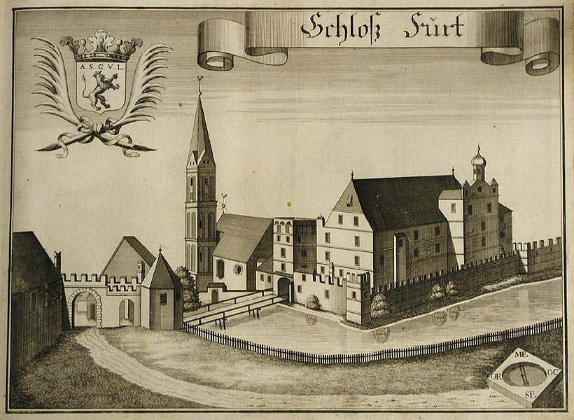 "Schloß Furt" (Furth bei Arth), aus : Beschreibung des Churfürsten- u. Hertzogthumbs Ober- und Nidern Bayrn. Rentamt Landshut, Gericht Rottenburg, 1723